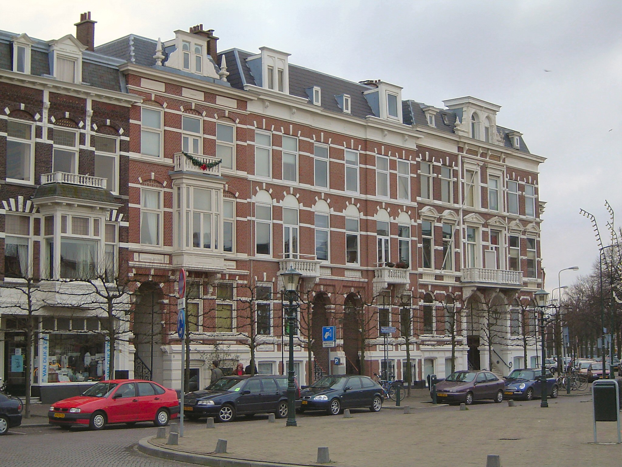 Den Haag, Netherlands, Regentessekwartier, Regentesseplein with Neo-Renaissance façades, author: Frank Kam Dec 27, 2005